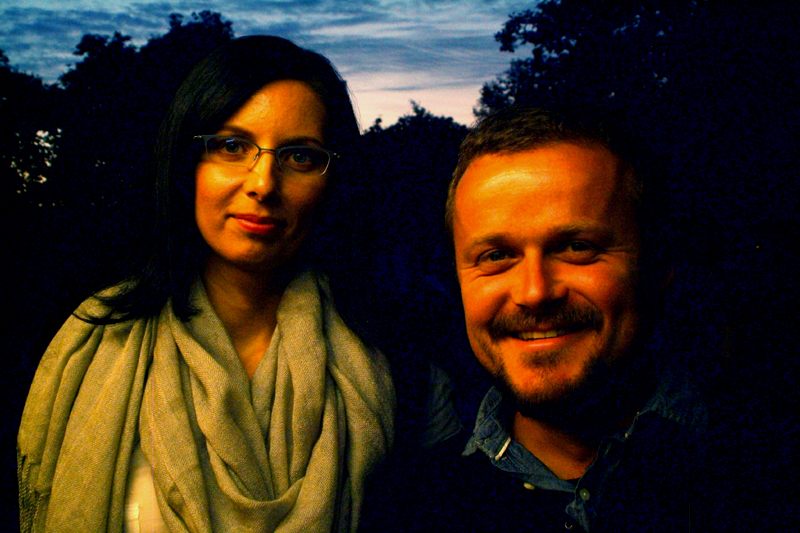 Die Künstler Helena Gaikalowa und Edin Bajric vom "Konnektor - Forum für Künste"; hier 2012 in der Abenddämmerung beim Merz-Karaoke auf dem Theodor-Lessing-Platz anläßlich des 15. Zinnober-Kunstvolkslaufes ...